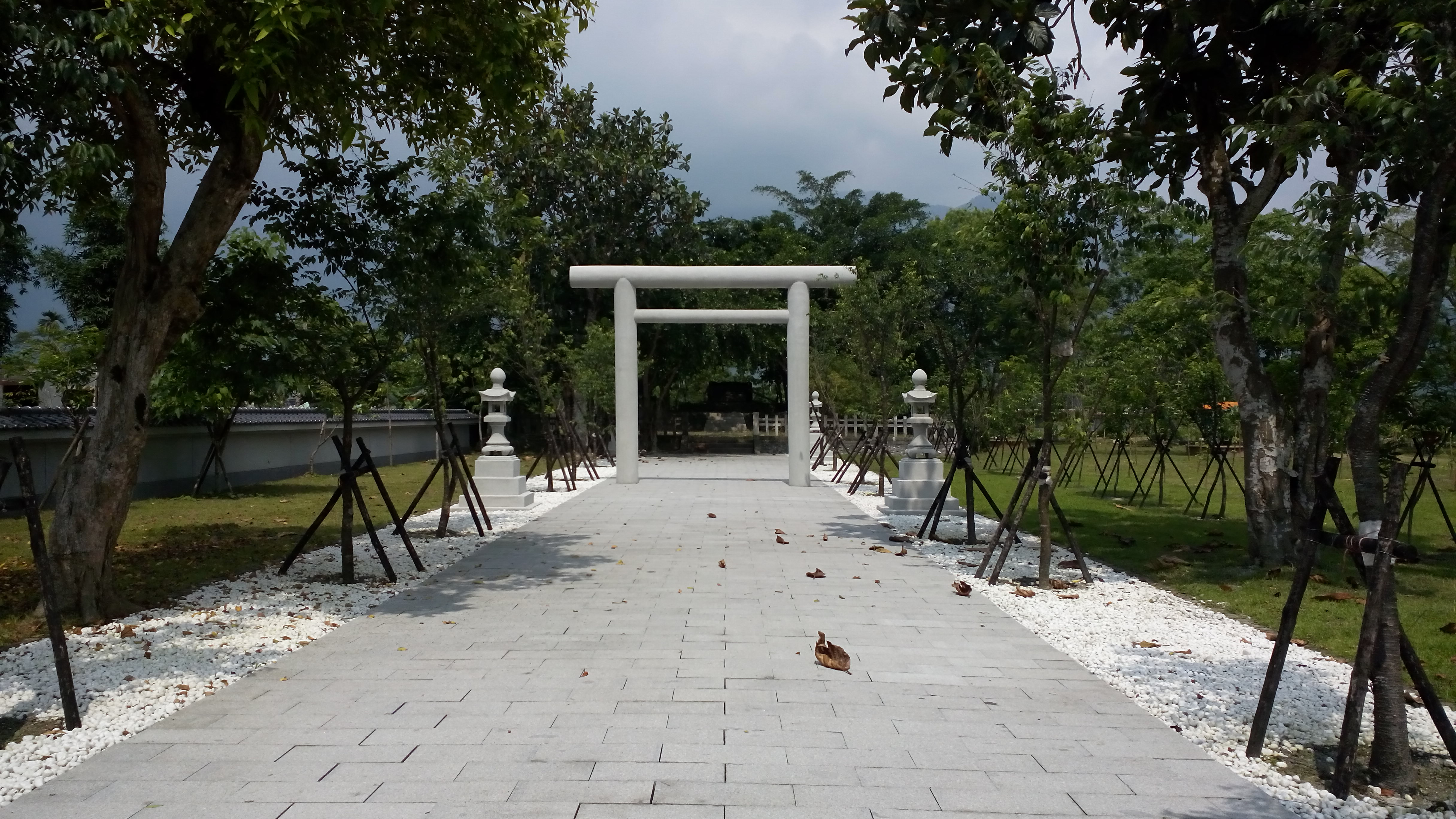 鳳林鎮林田公園